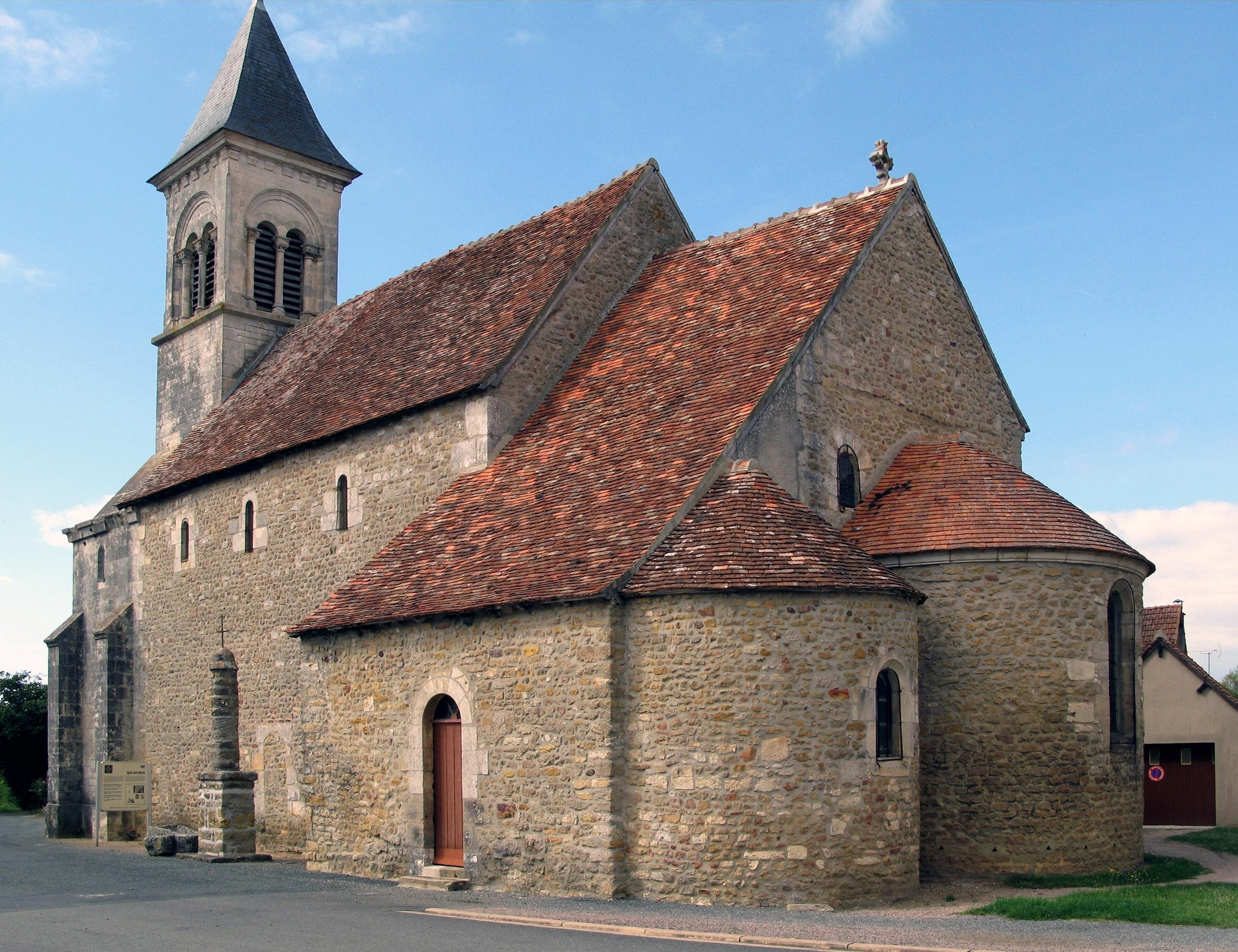 Nohant-Vic (Indre, France) - L'église Saint-Martin de Vic. . .